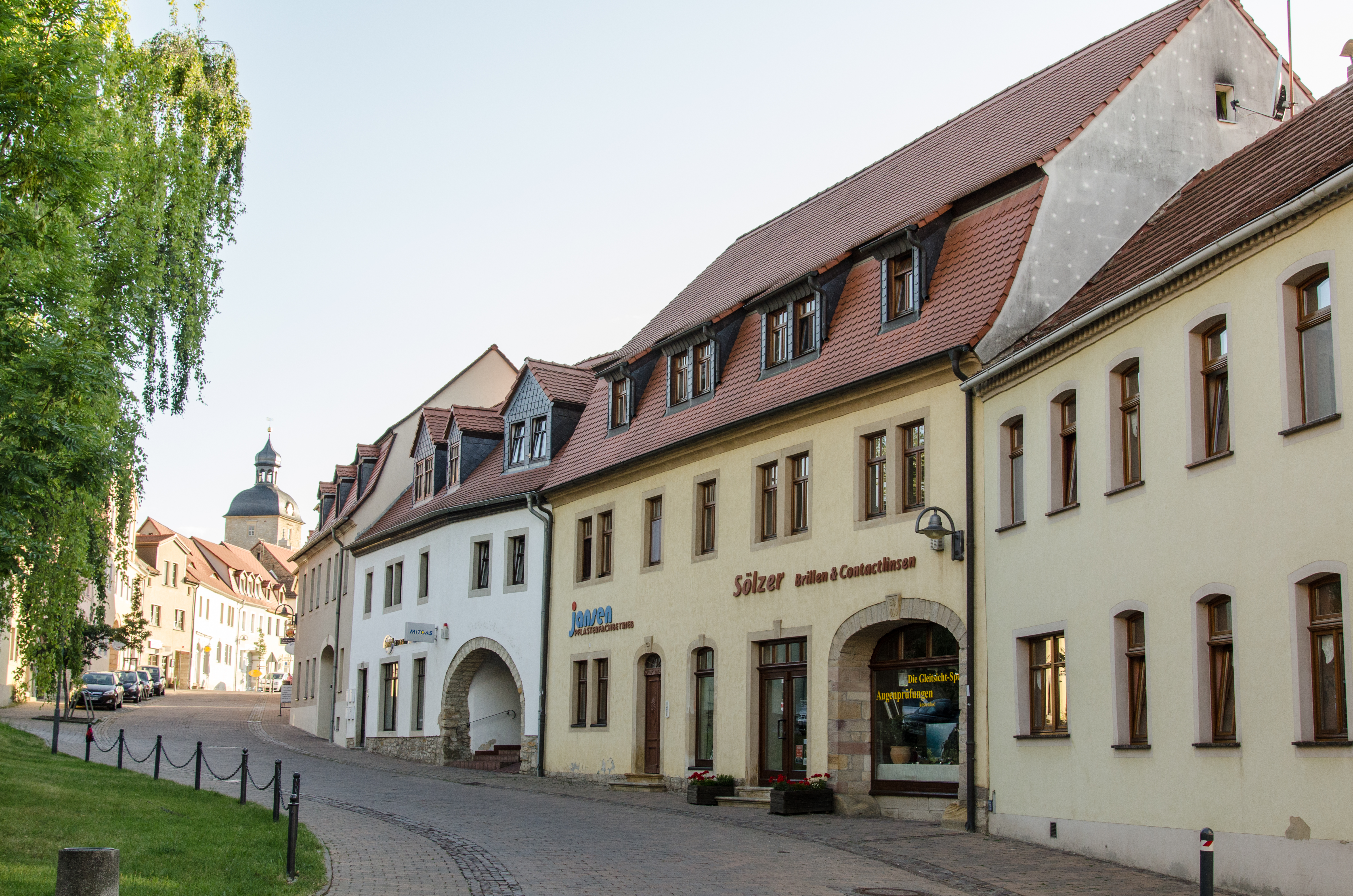 Querfurt, Klippe 5, 7, 9